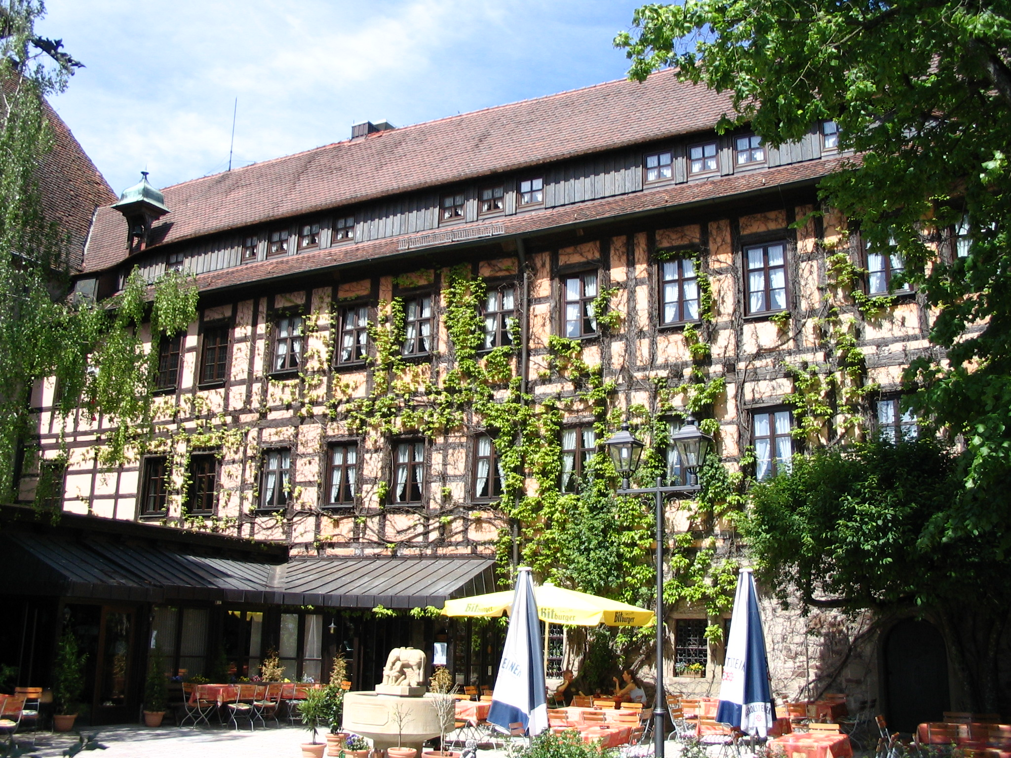 Fachwerkanbau der Burg Colmberg